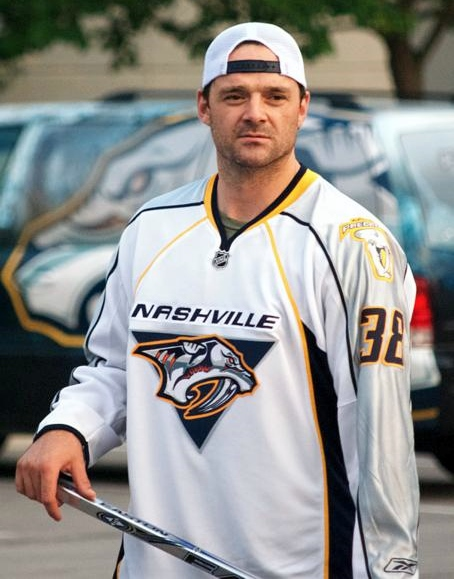 Vernon Fiddler